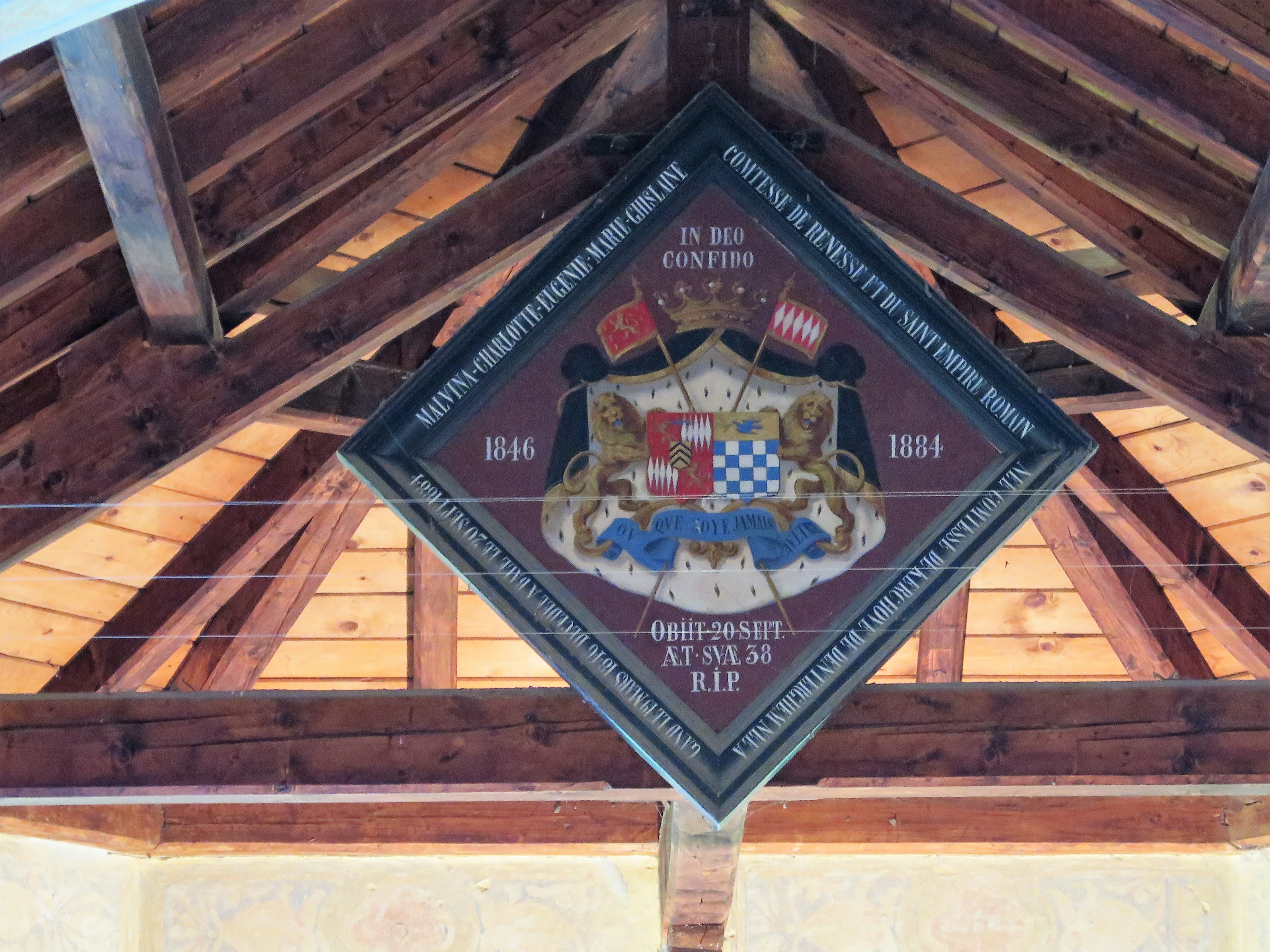 Totenschild der Gräfin Malvina de Renesse, geborene de Kerkove von Deterghem, Gattin des Grafen Camille de Renesse, in der Chiesa bianca in Maloja